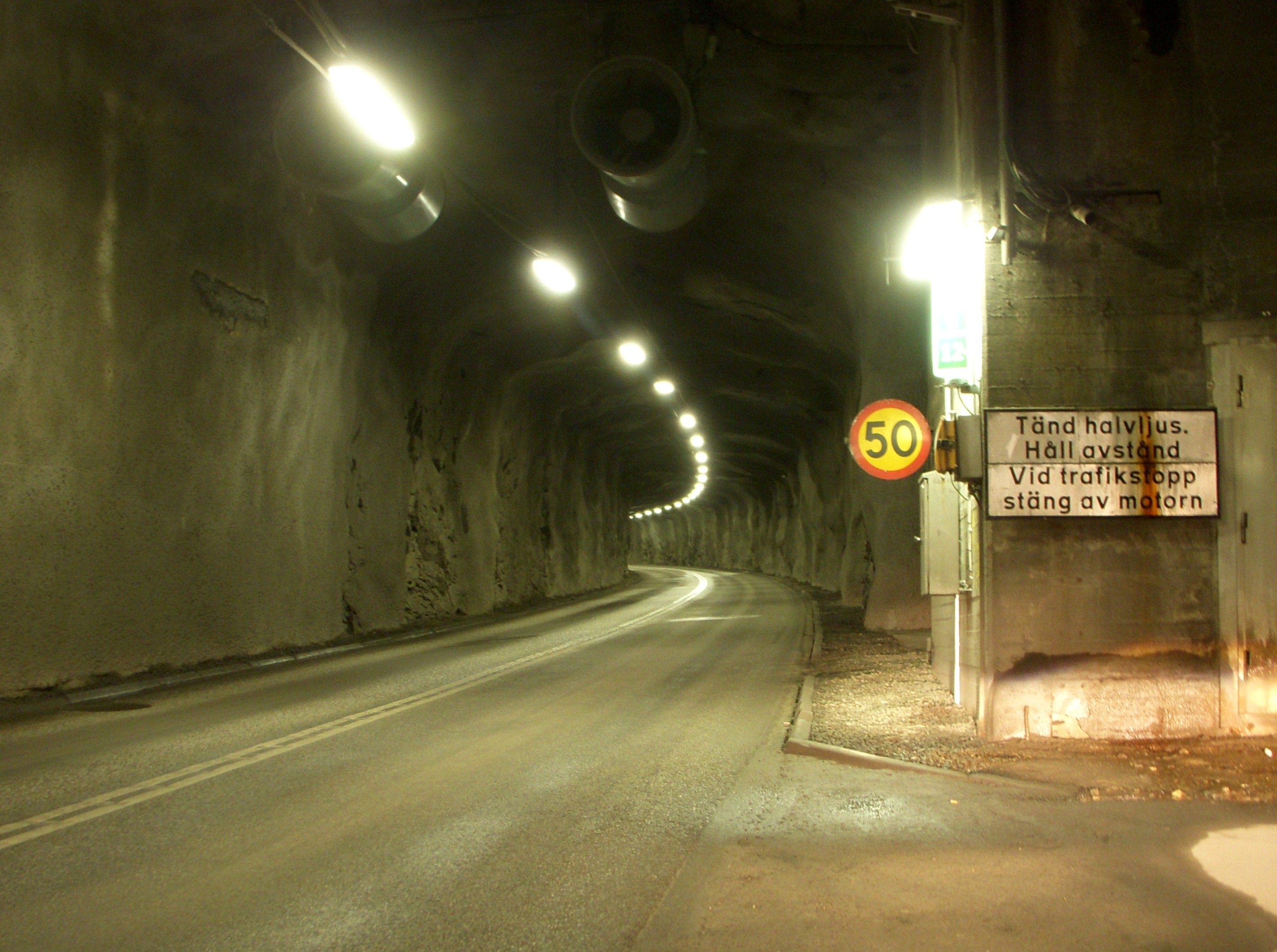 I Muskötunneln, färdrikning mot Muskö, nödficka